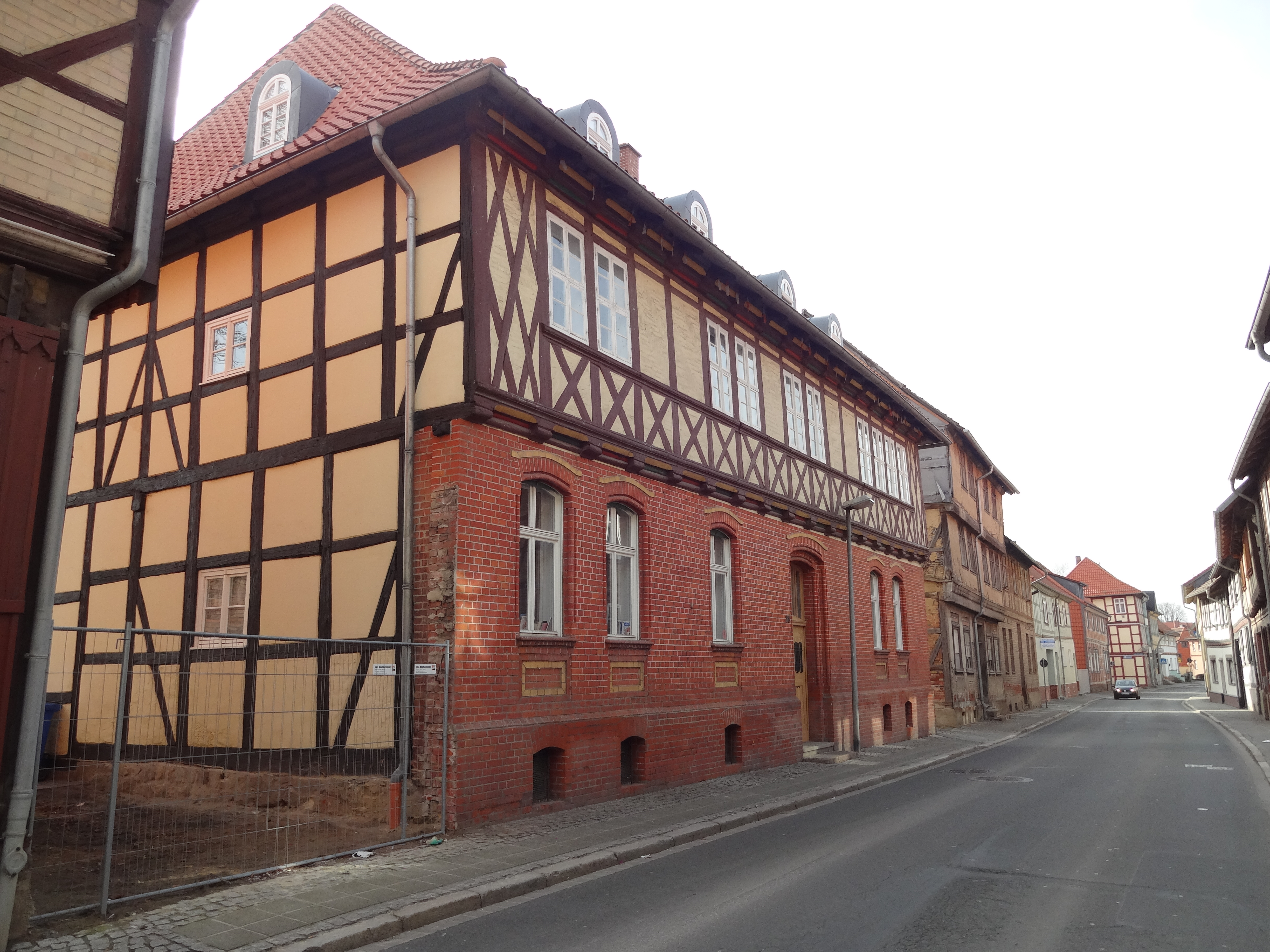 denkmalgeschütztes Fachwerkhaus in der Halberstädter Straße 28 in Derenburg, Ortsteil von Blankenburg (Harz)